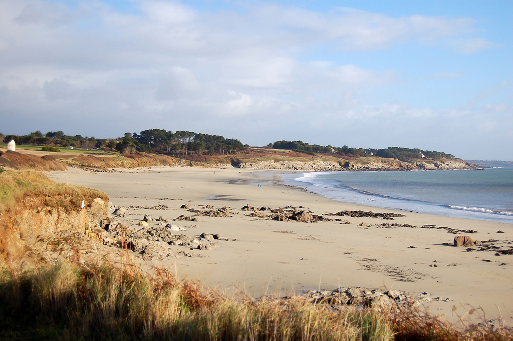 La plage de Raguénez à Névez